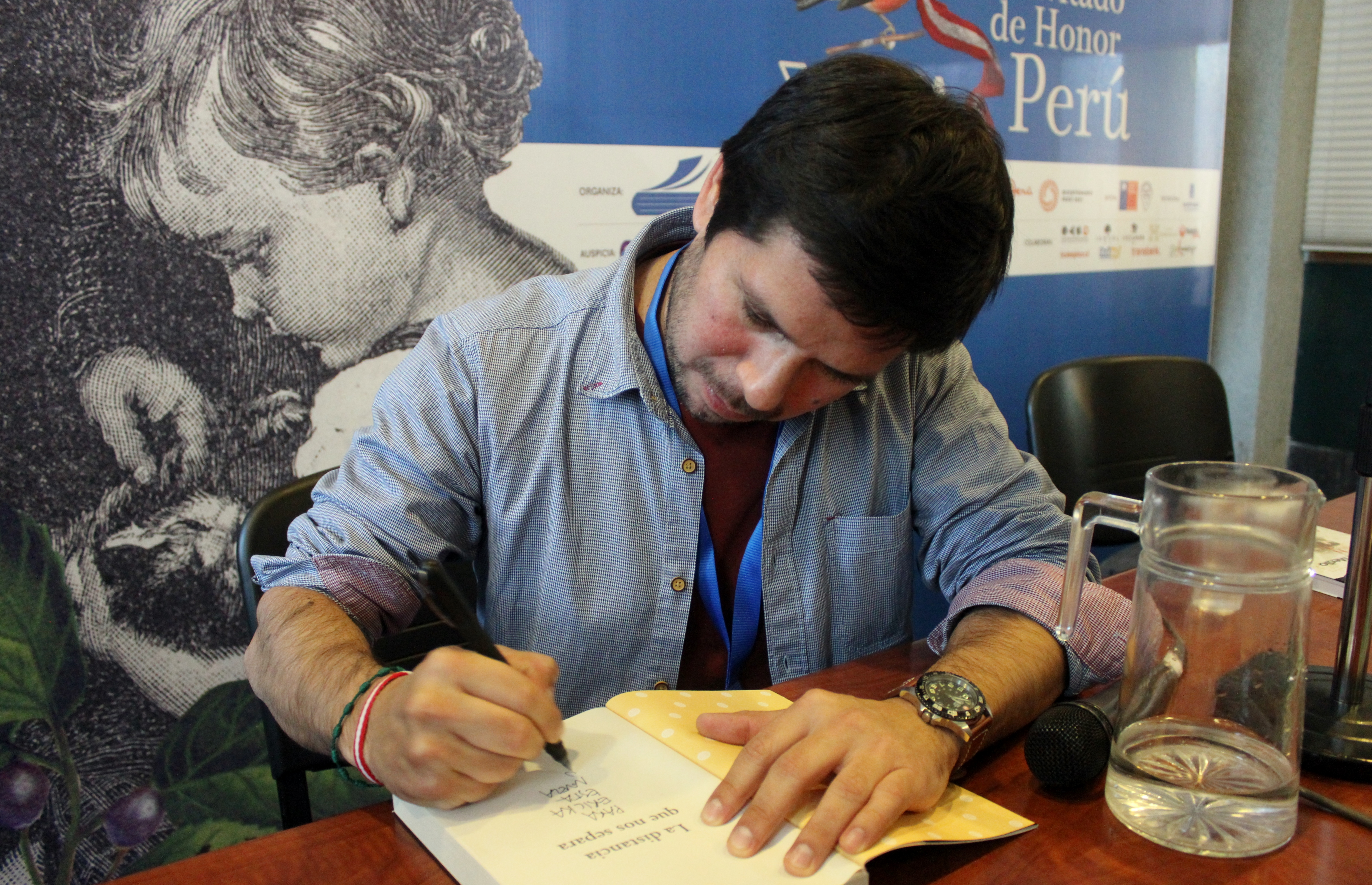 El escritor peruano Renato Cisneros firma su novela Dejarás la tierra durante la mesa Madres, padres y familias. La narrativa autobiográfica, realizada en la Feria Internacional del Libro de Santiago 2018 (sala Acario Cotapos, 2 de noviembre).